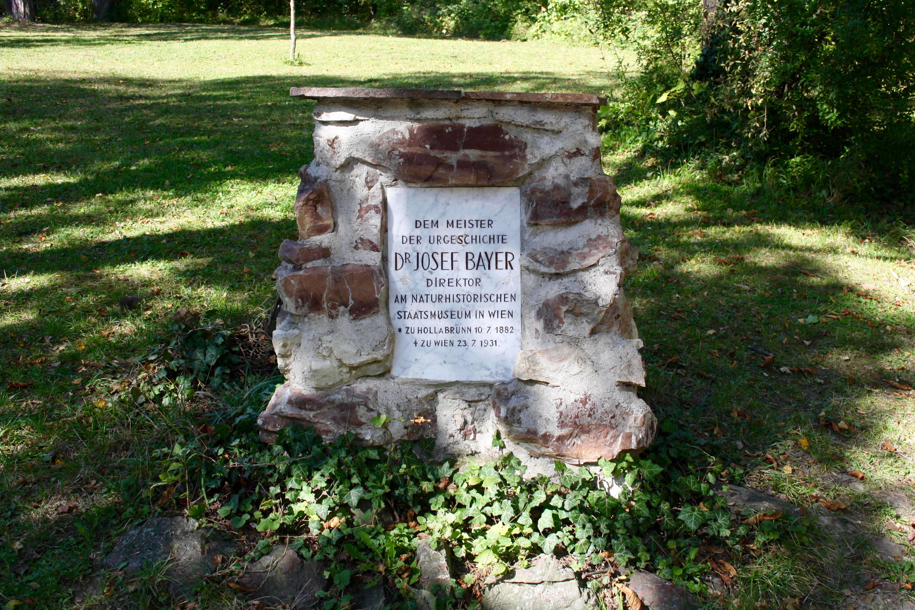 Gedenkstein für Dr. Josef Bayer beim Rasthaus Schießstätte im Maurer Wald in Wien.